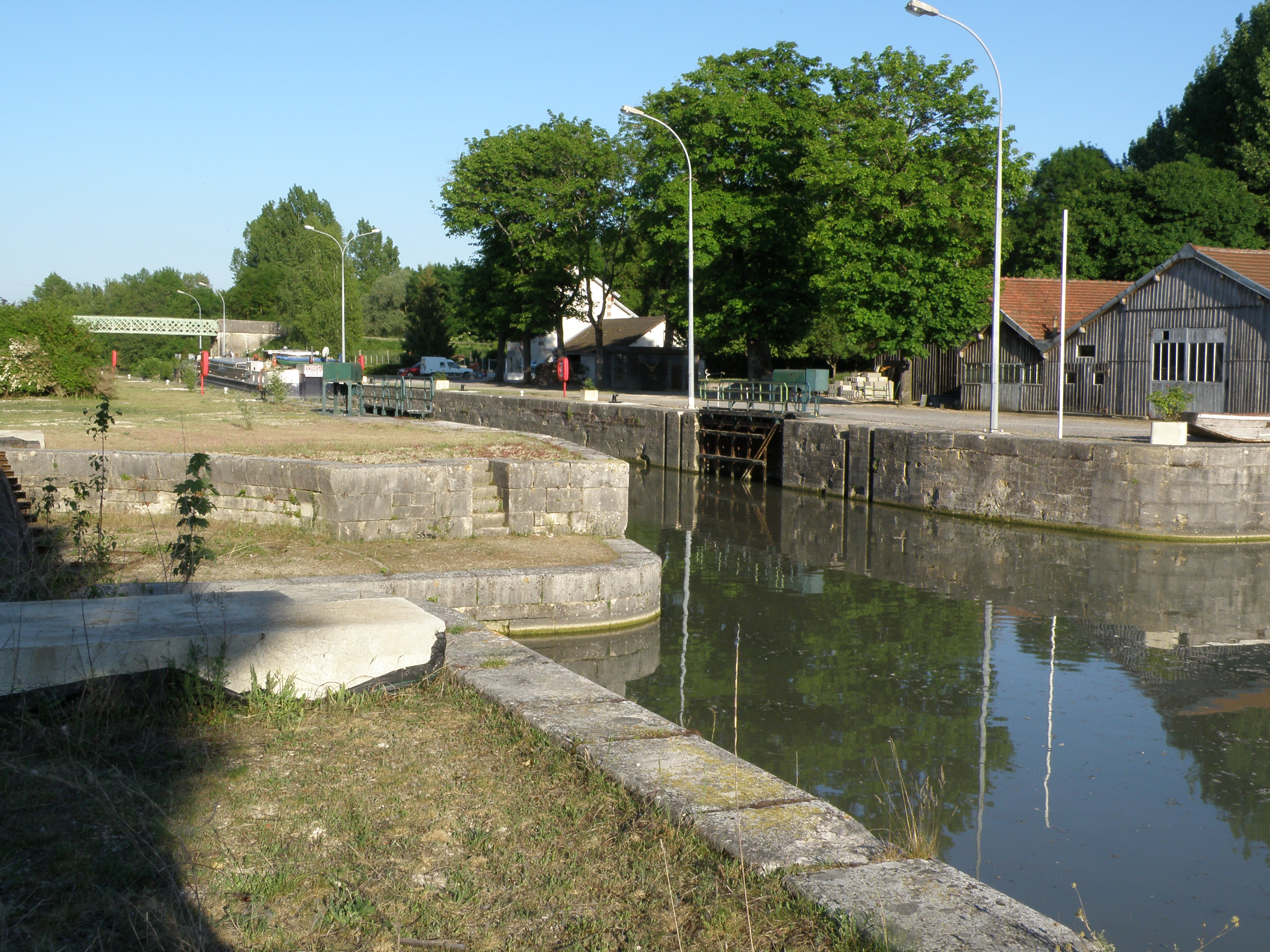 Ecluse de Beaulieu. 10400 Le Mériot